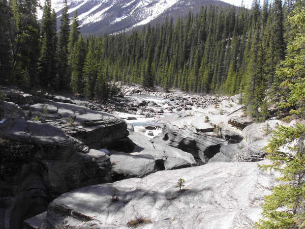 Mistaya Canyon cq. Mistaya River